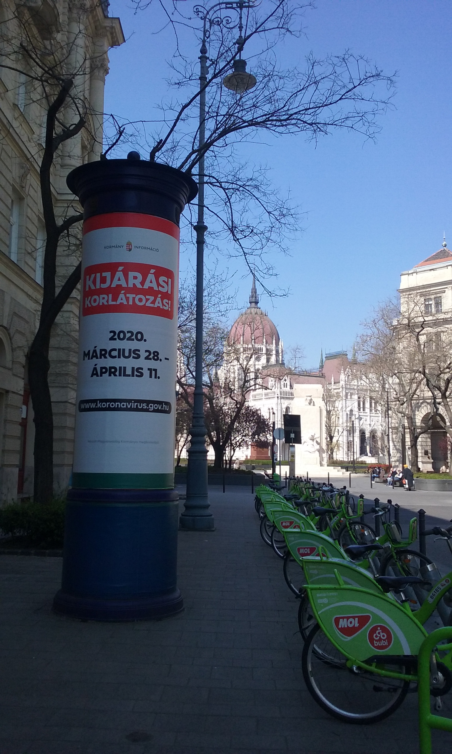 A kijárási korlátozásról tájékoztató hirdetőoszlop Budapesten, a Kossuth térnél, Vécsey utca